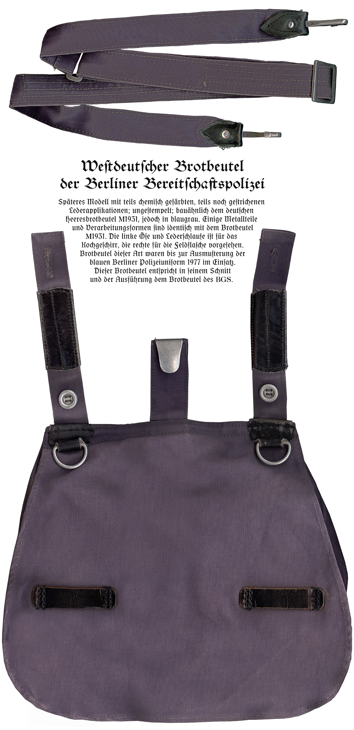 Brotbeutel der Berliner Bereitschaftspolizei / bread bag of the Berlin Bereitschaftspolizei